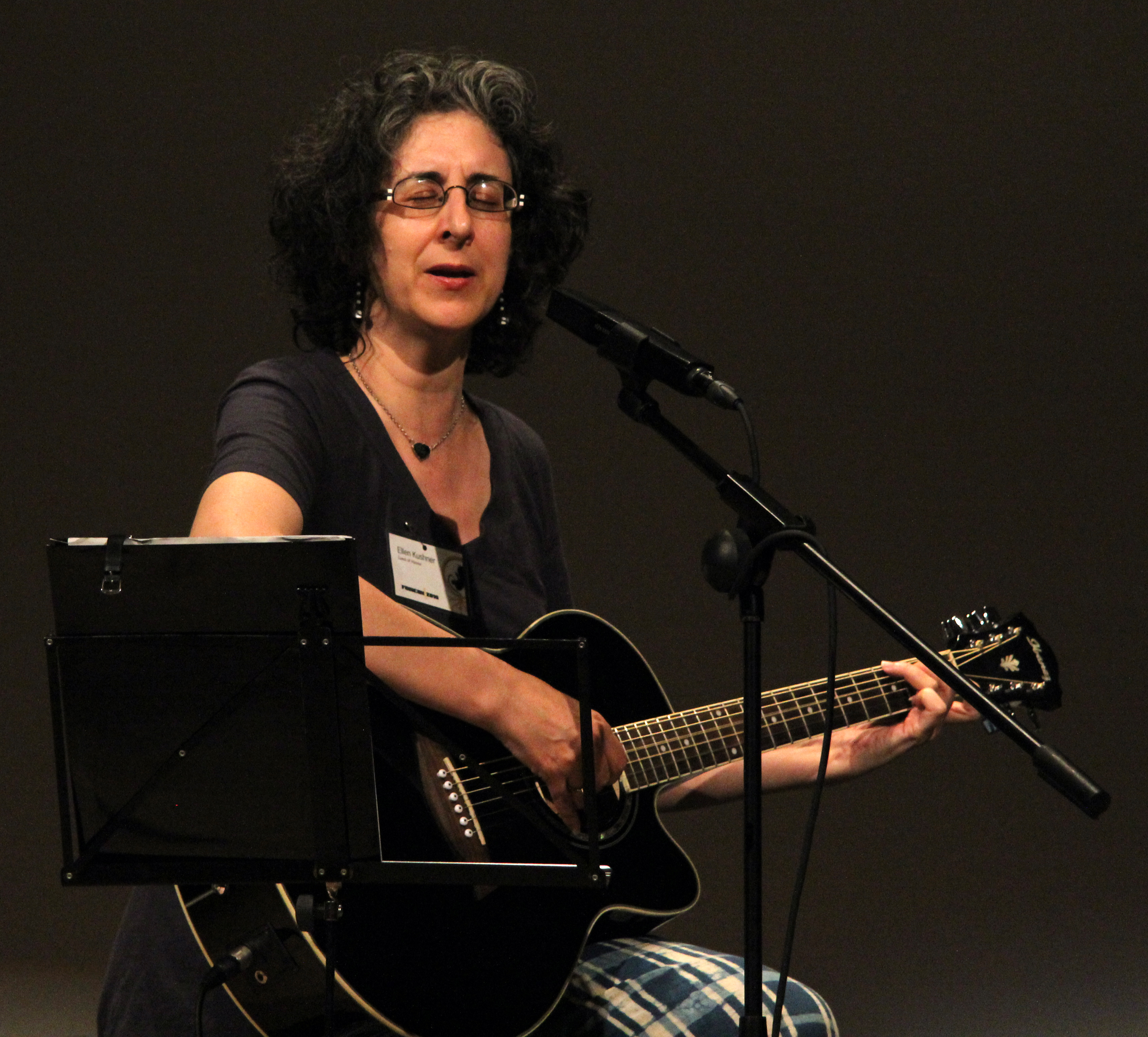 Ellen Kushner at Finncon 2010.